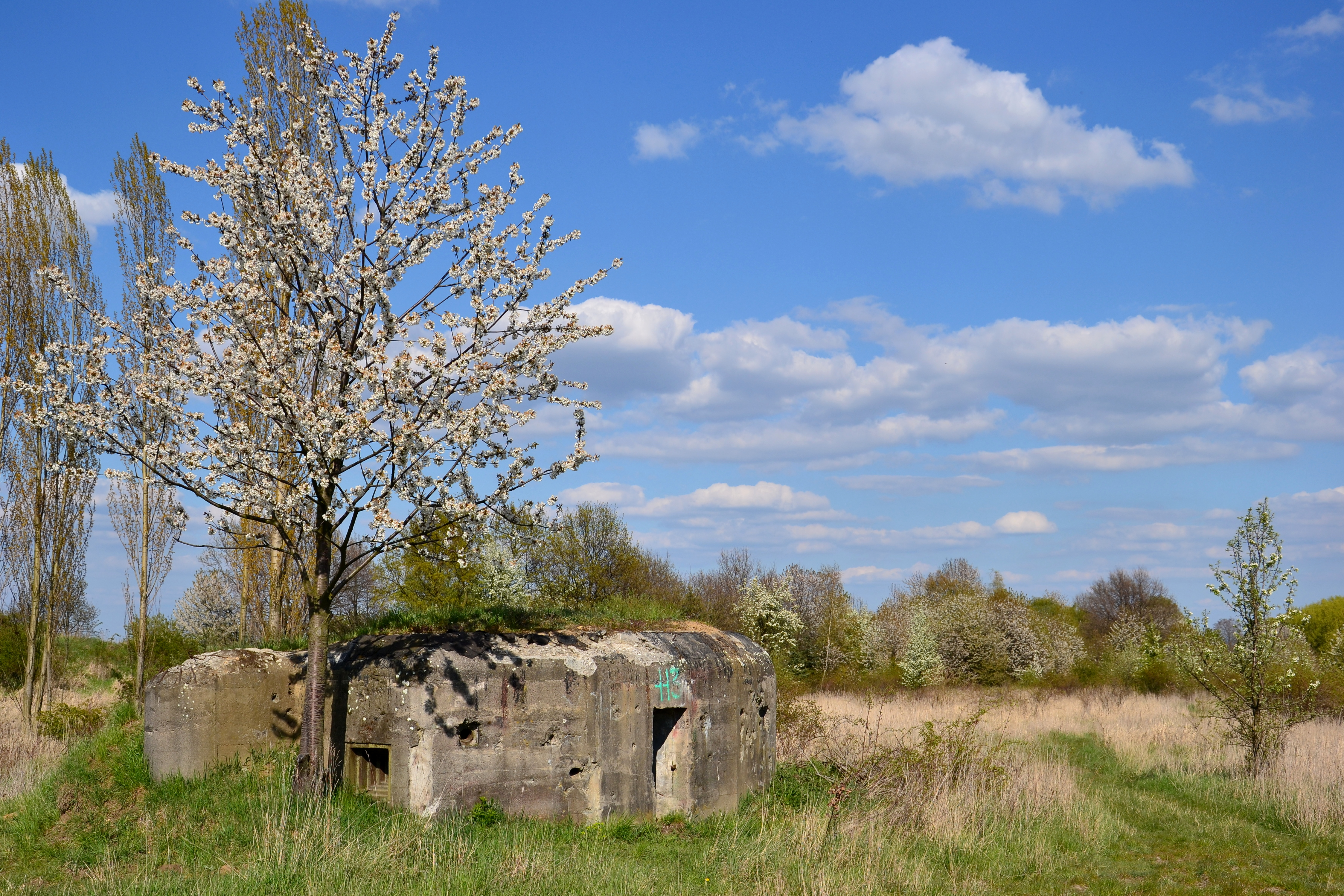 Československé opevnění z roku 1937, objekt K-51/19/A-180